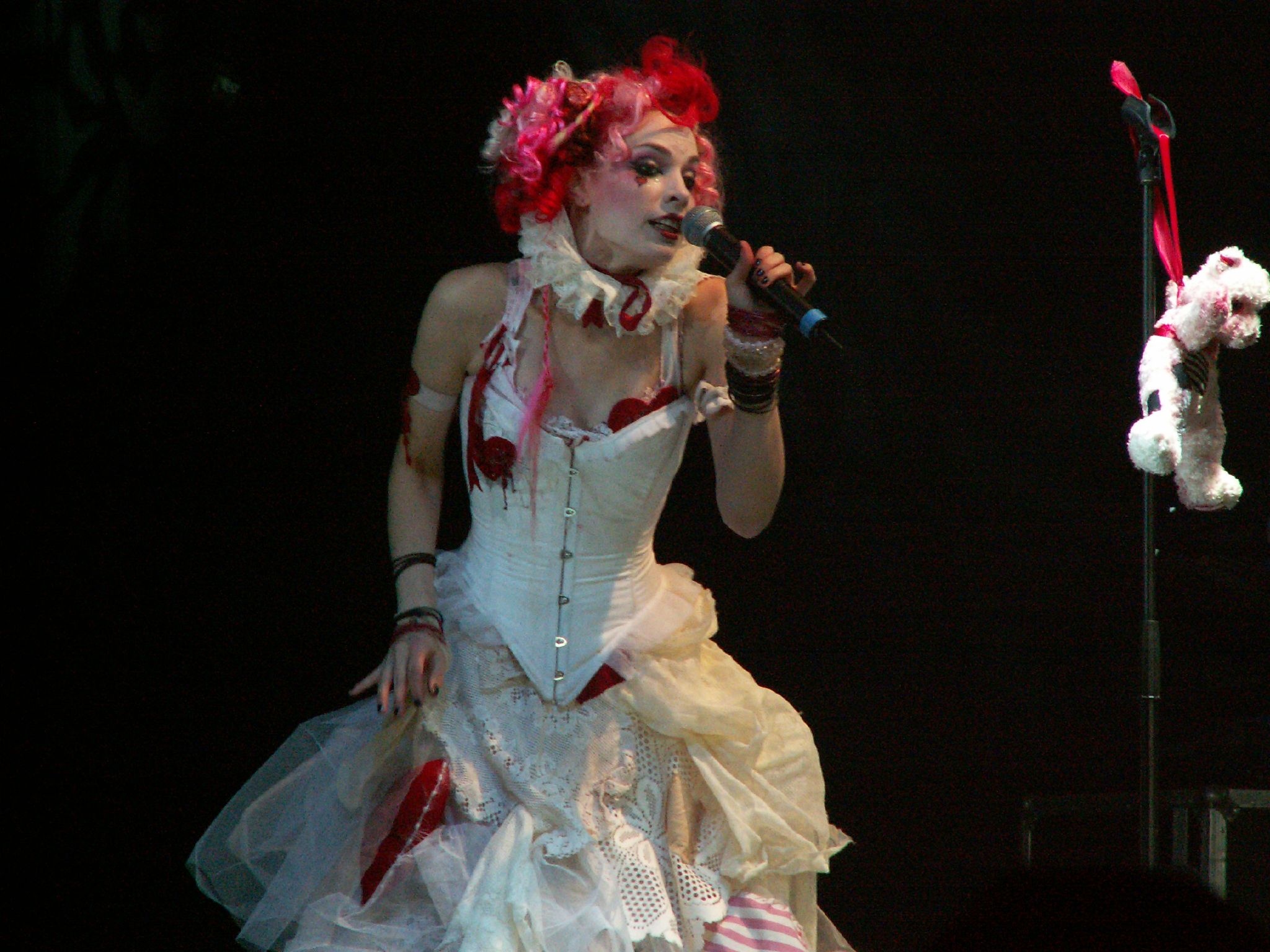 Emilie Autumn performing at M'era Luna on 2007-08-11.